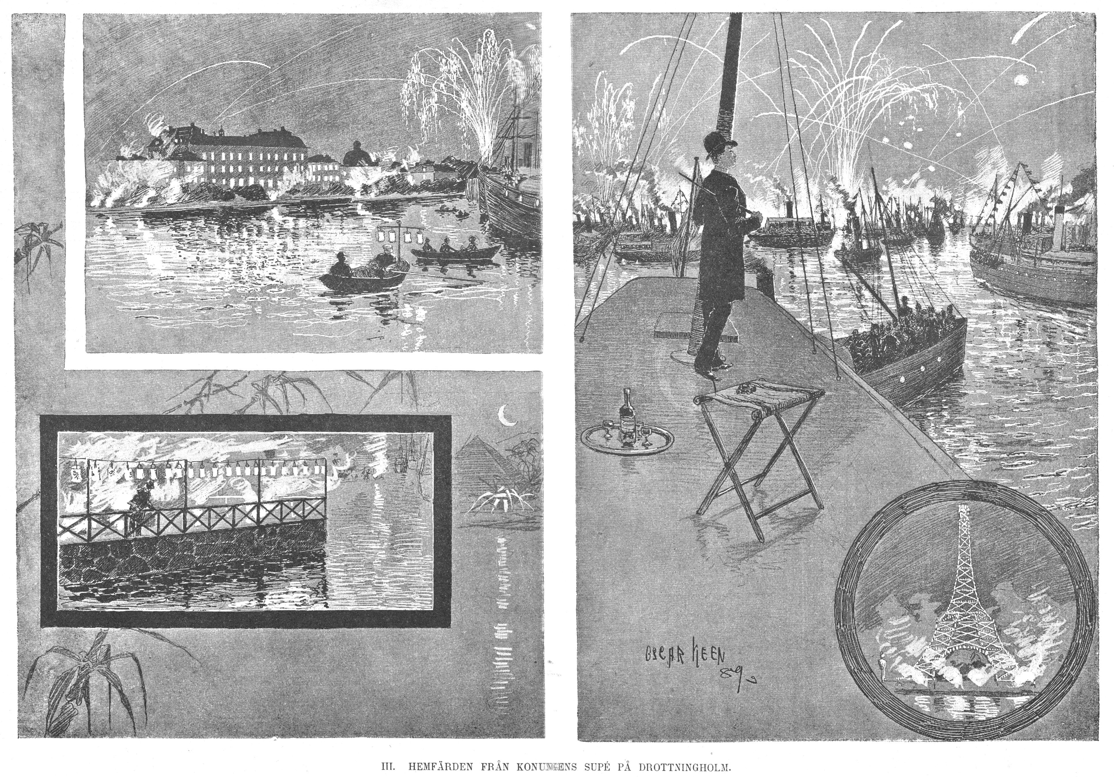 Den VIII:de internationella orientalkongressen i Stockholm och Oslo 1889. Bild från tidskriften Svea 1889.